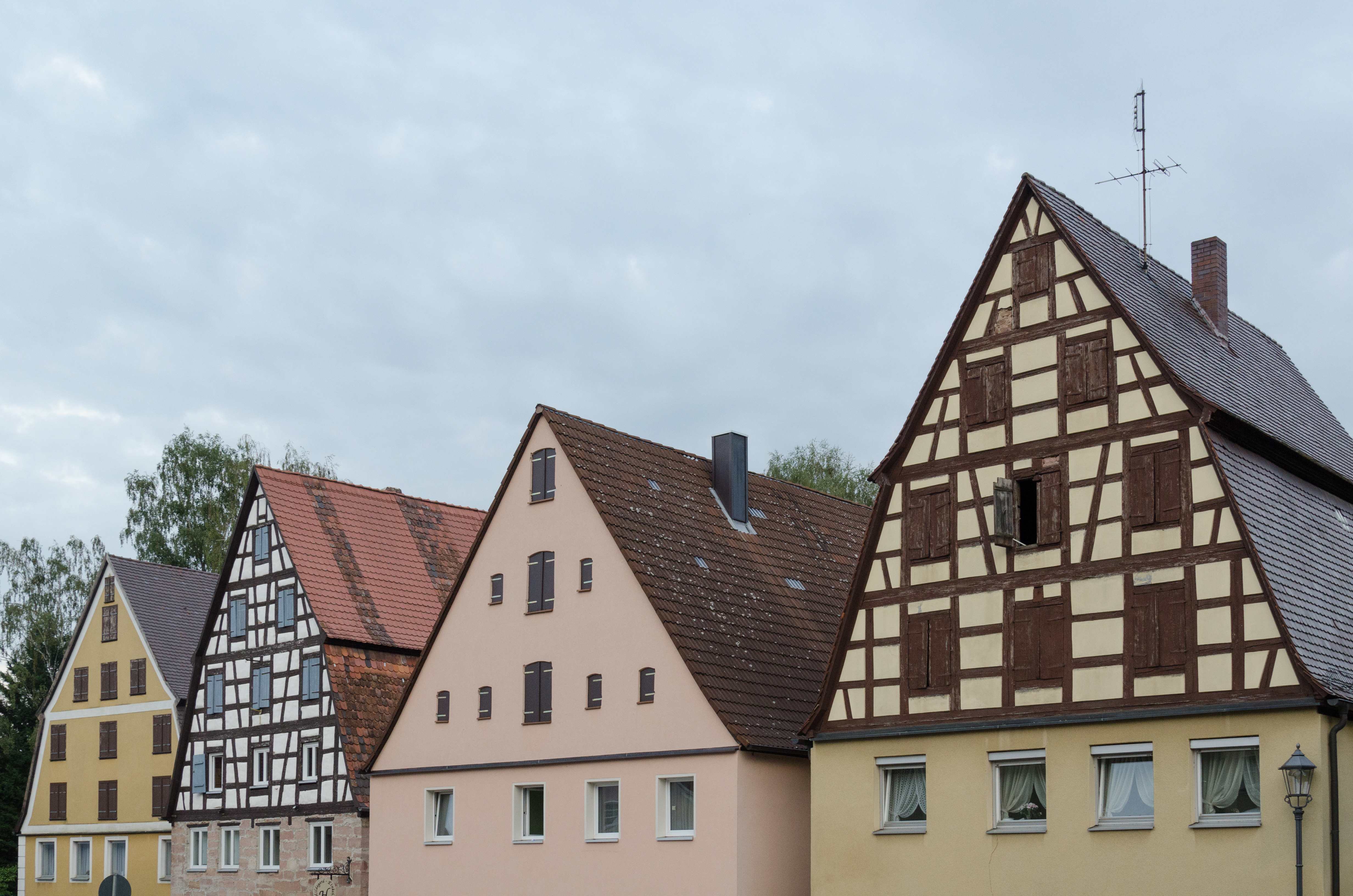 Spalt, Albrecht-Achilles-Straße 7, 9, 13, 15